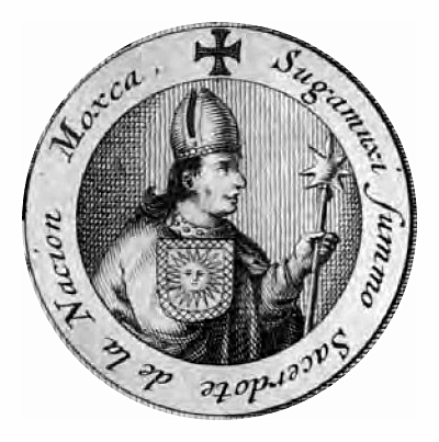 Sugamuxi